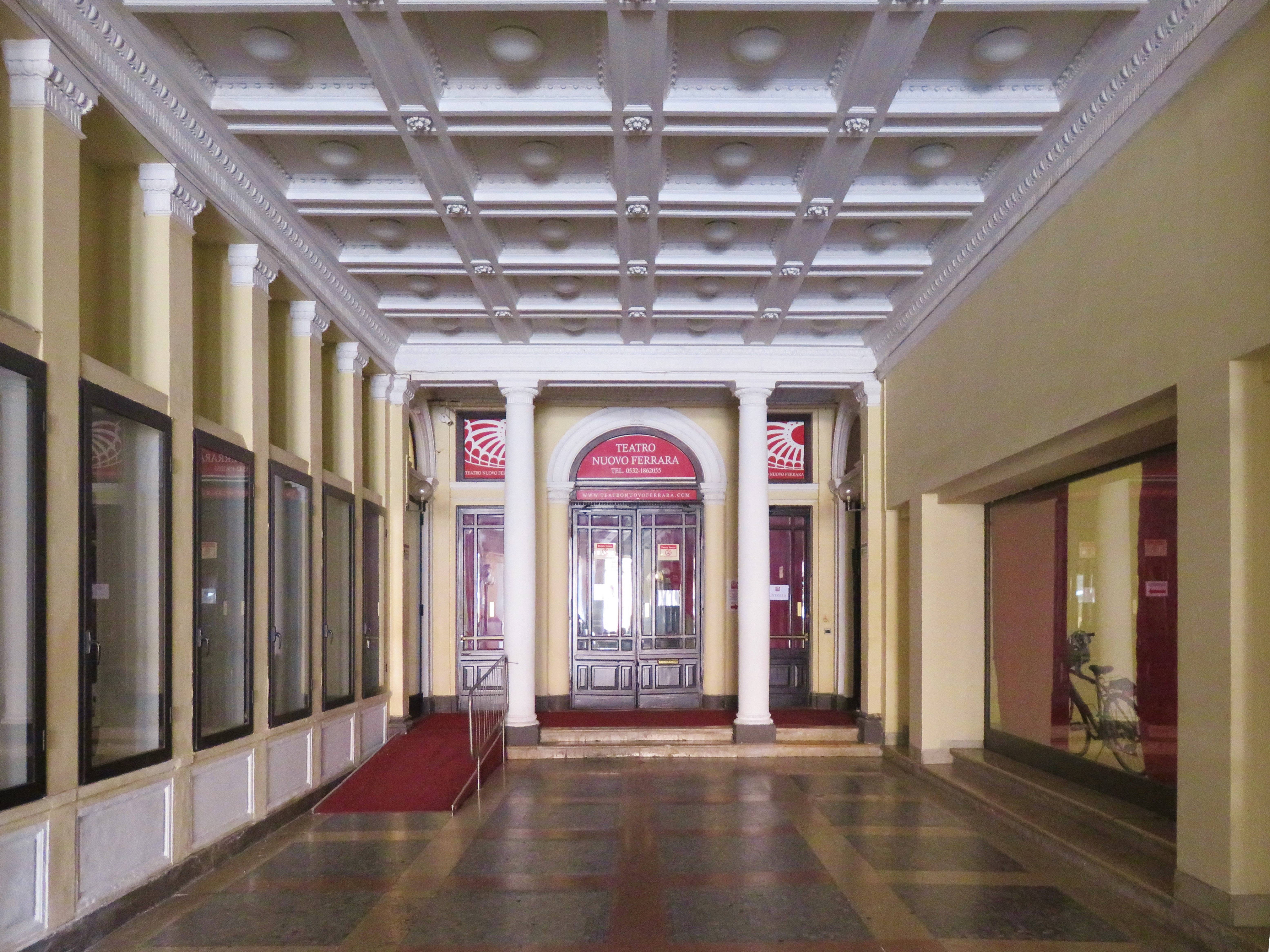 Atrio del teatro